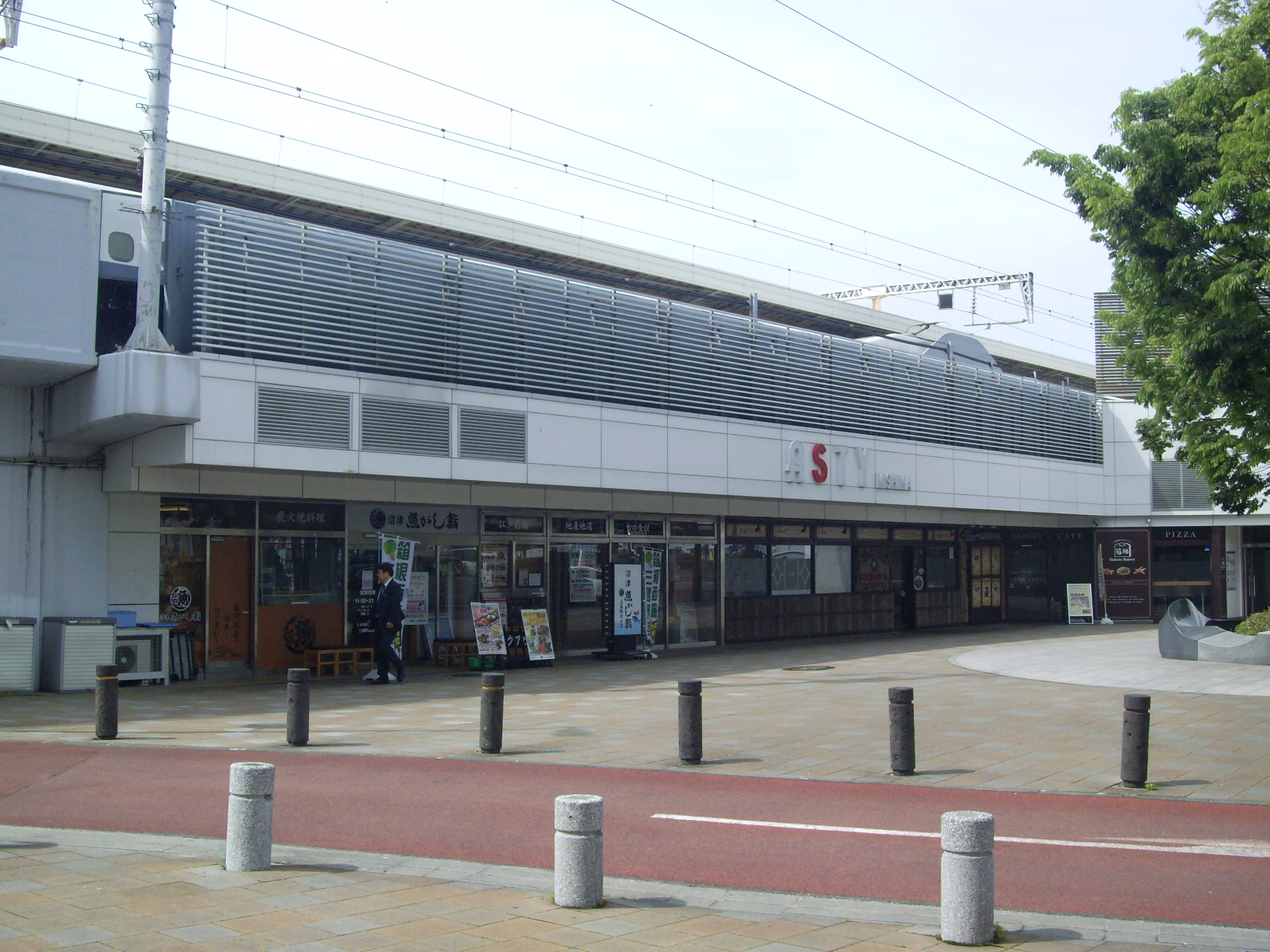 三島駅北口・新幹線上りホーム下のアスティ三島 ㊟カメラを起動すると日付機能が出荷時のものに初期化されるため、ファイル履歴の投稿日時とメタデータの原画像データの生成日時が異なります（本概要欄の下記日付が撮影日）